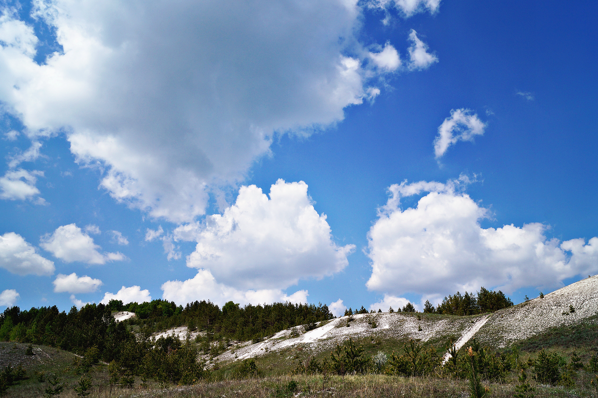 Весенняя практика биологического факультета Саратовского Государственного Университета им.Н.Г. Чернышевского Хвалынский, Хвалынский район Подъем на меловую гору, по пути собирали наземных беспозвоночных This image is related to the protected area of Russia number 6400157